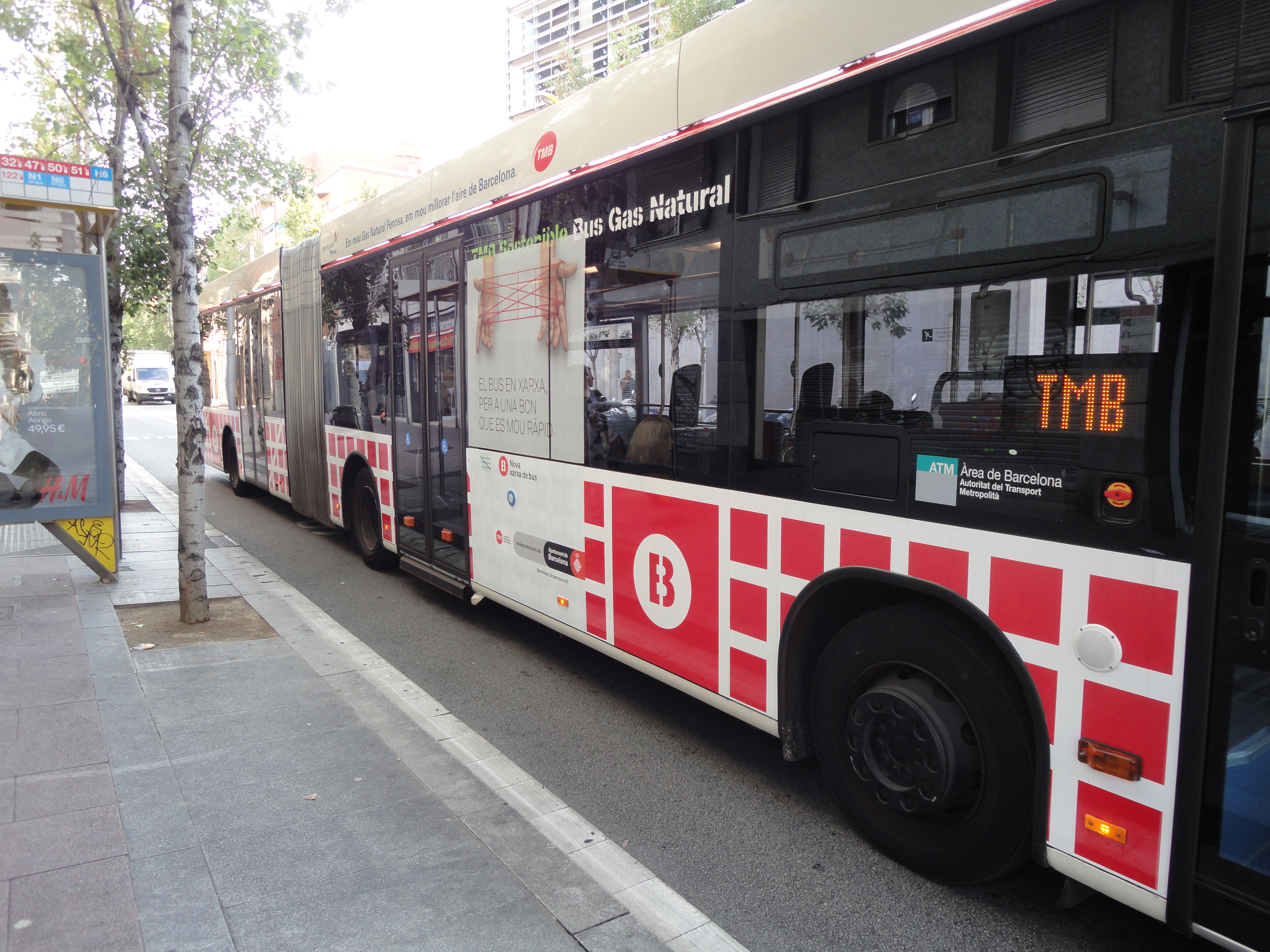 Autobús de la XOAB